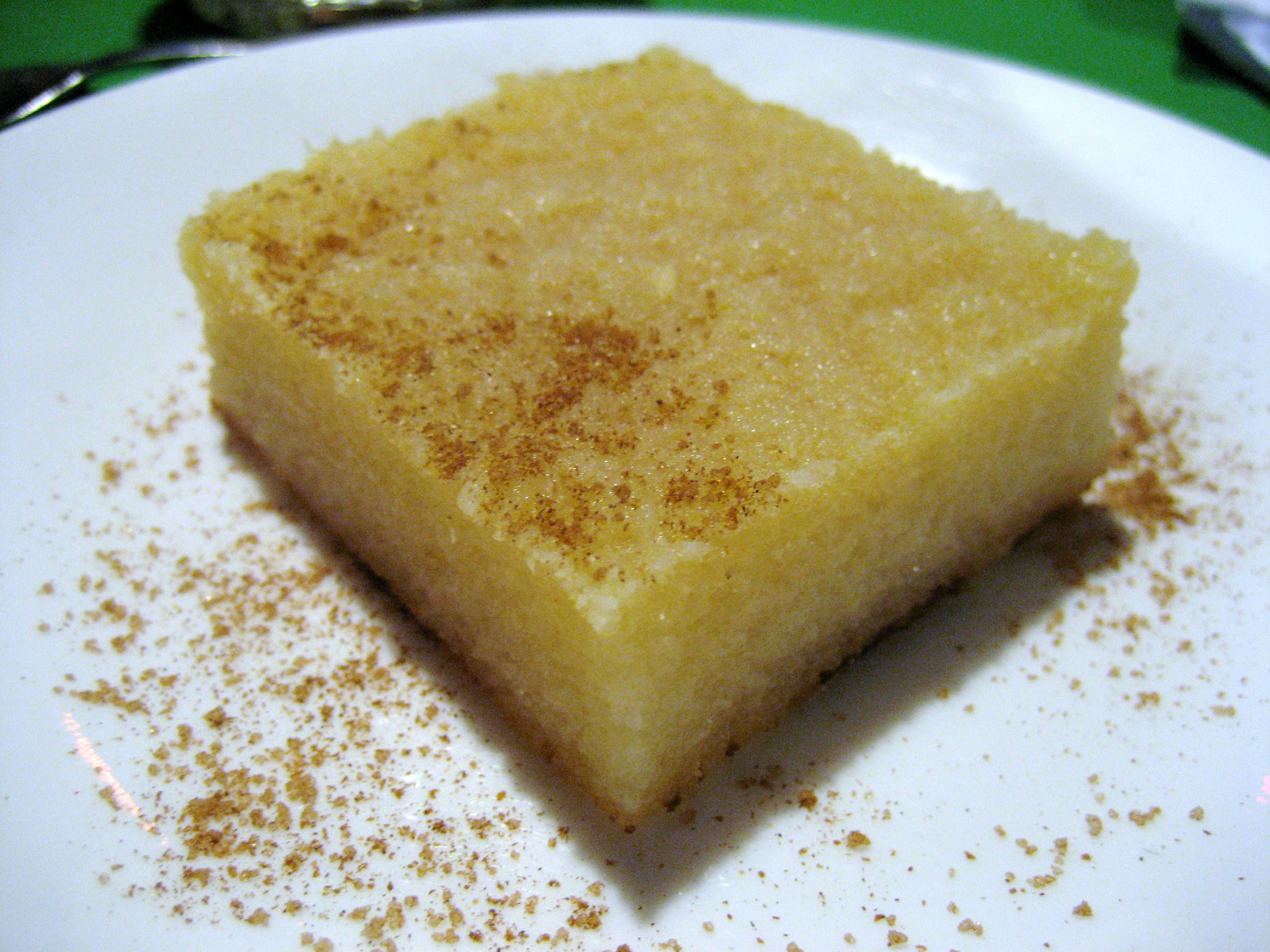 Cassava Pone